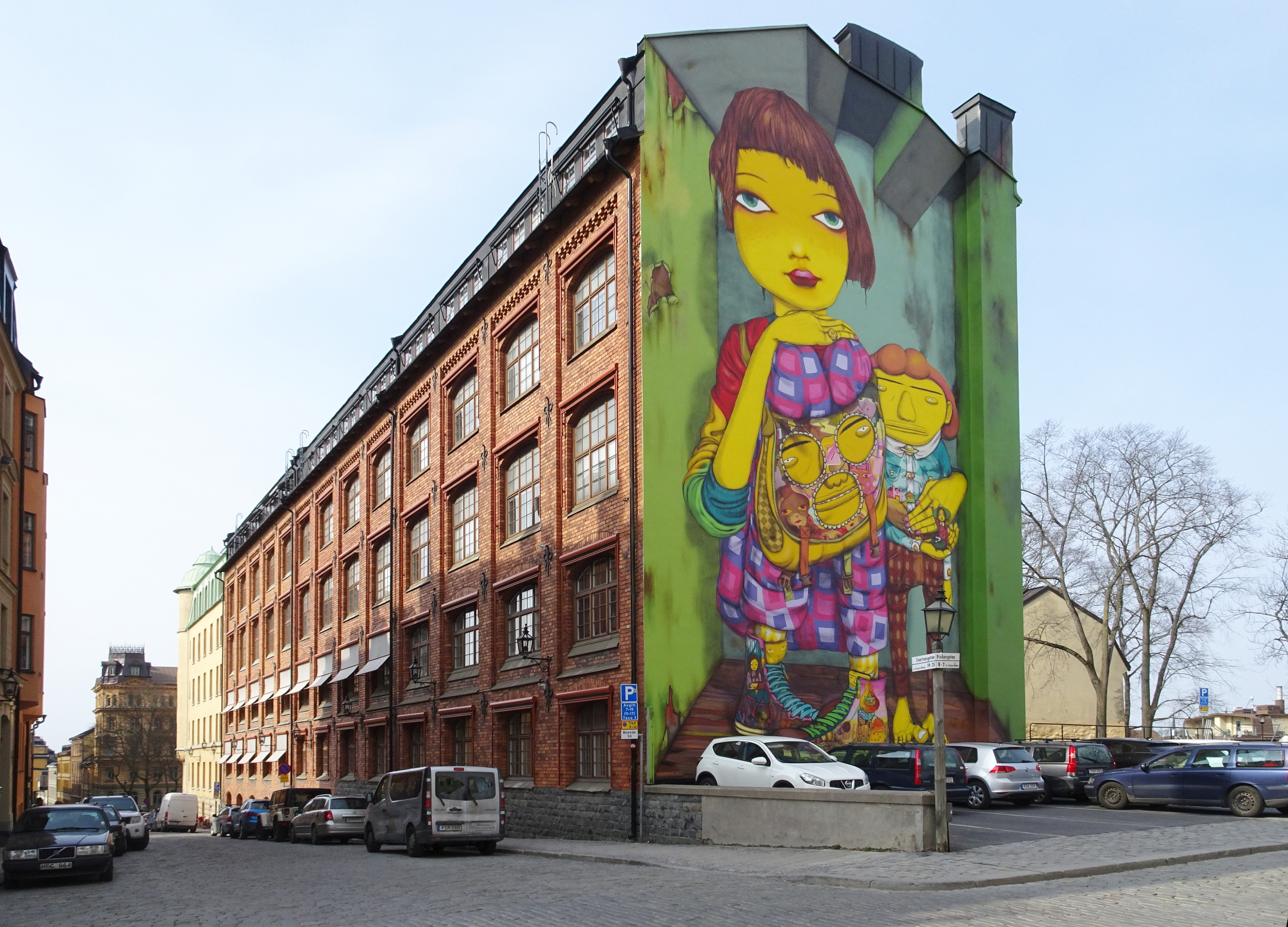 Fastigheten Fiskaren mindre 14 med muralmålning av brasilianska tvillingbröderna Otávio och Gustavo Pandolfo.